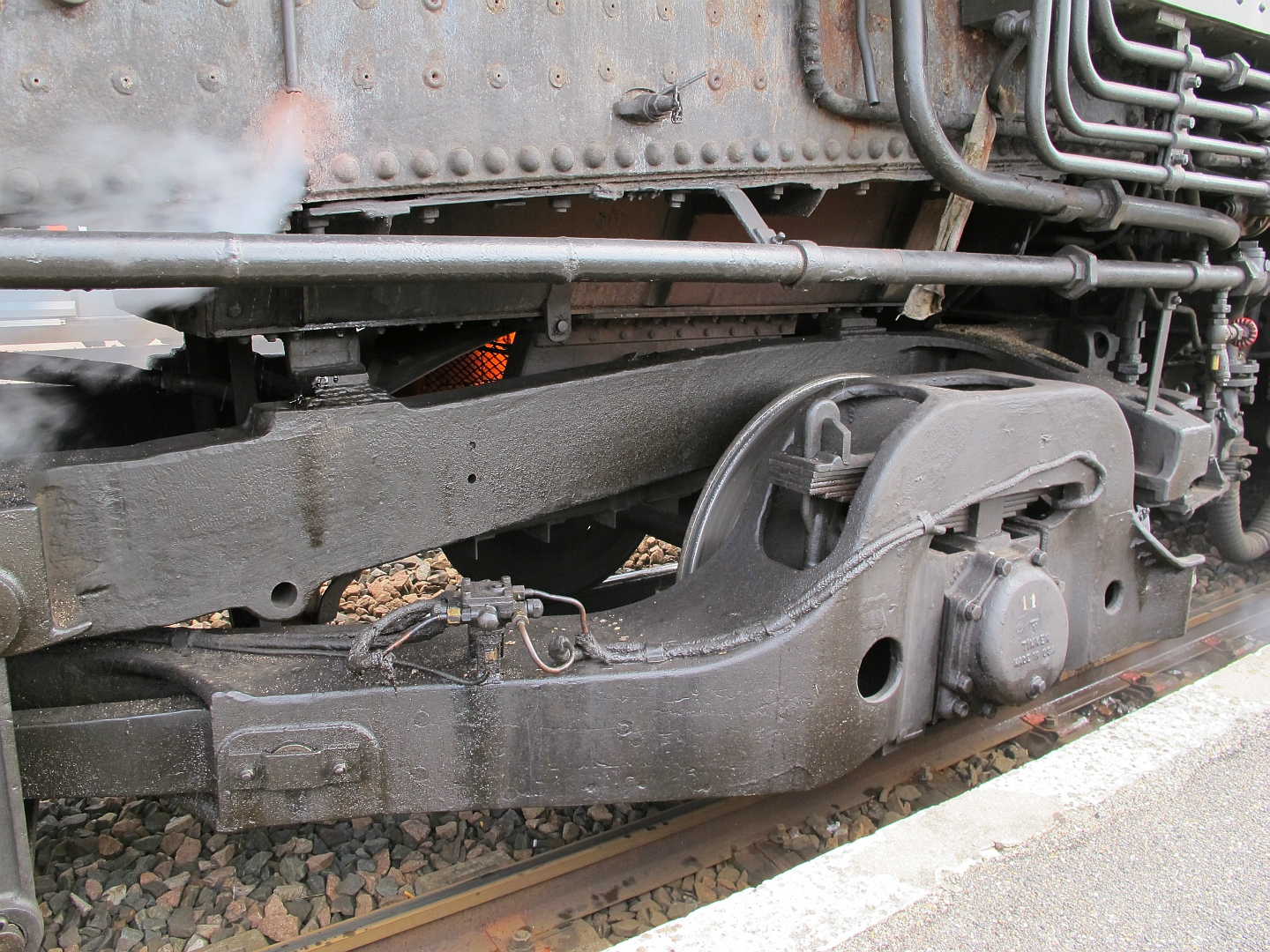 Le bissel Delta de la 141 R 1126.